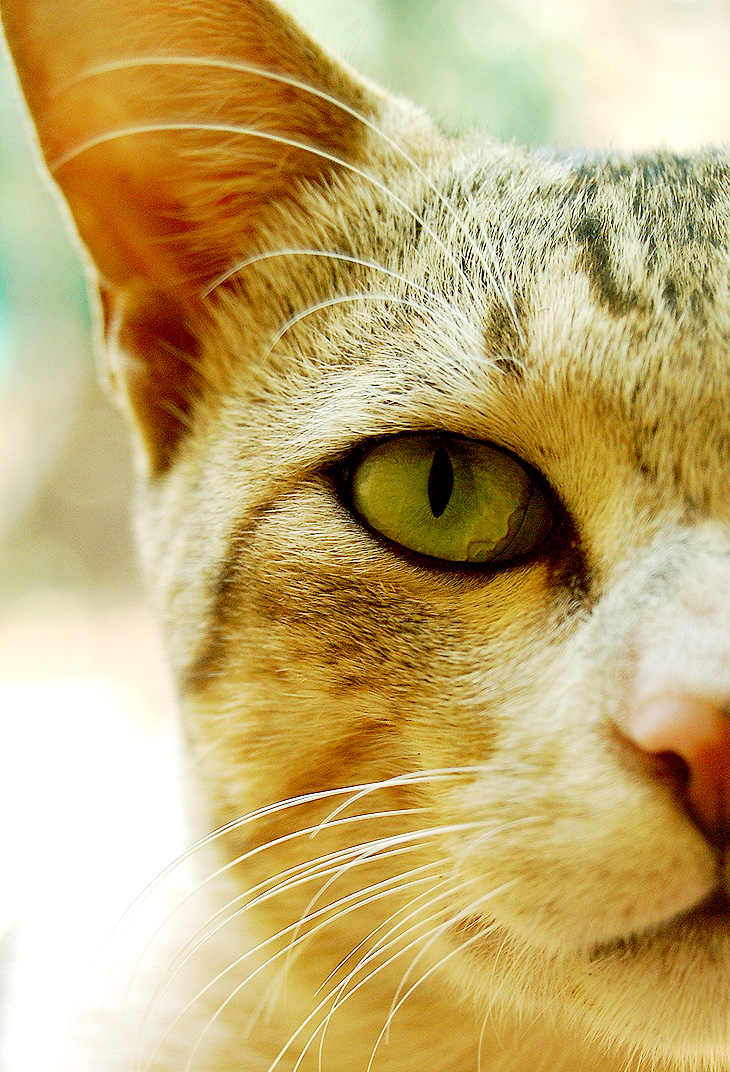 പൂച്ചയുടെ കണ്ണ്